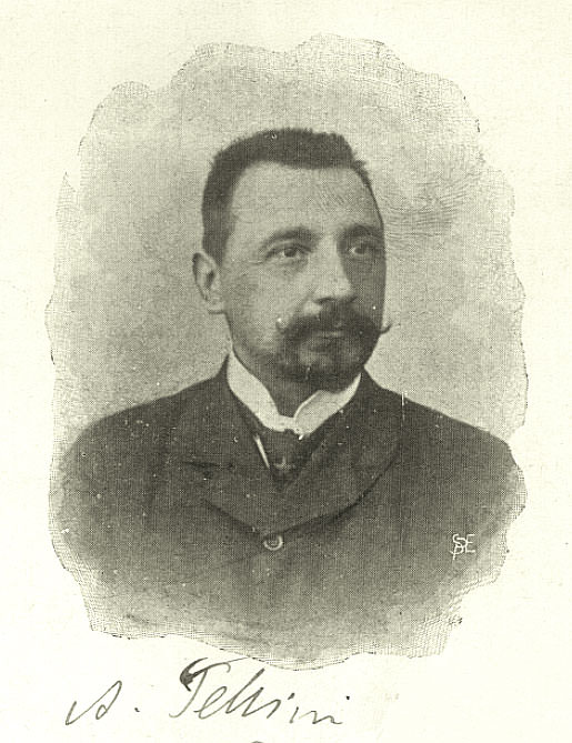 Achille Tellini nel 1912